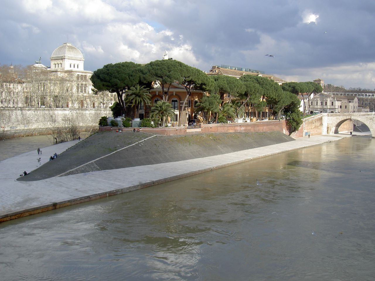 Isola Tiberina, Roma, Italia